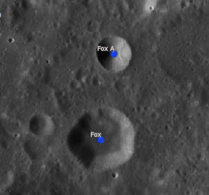 Cráter lunar Fox. Cráteres satélite. (Imagen LROC)